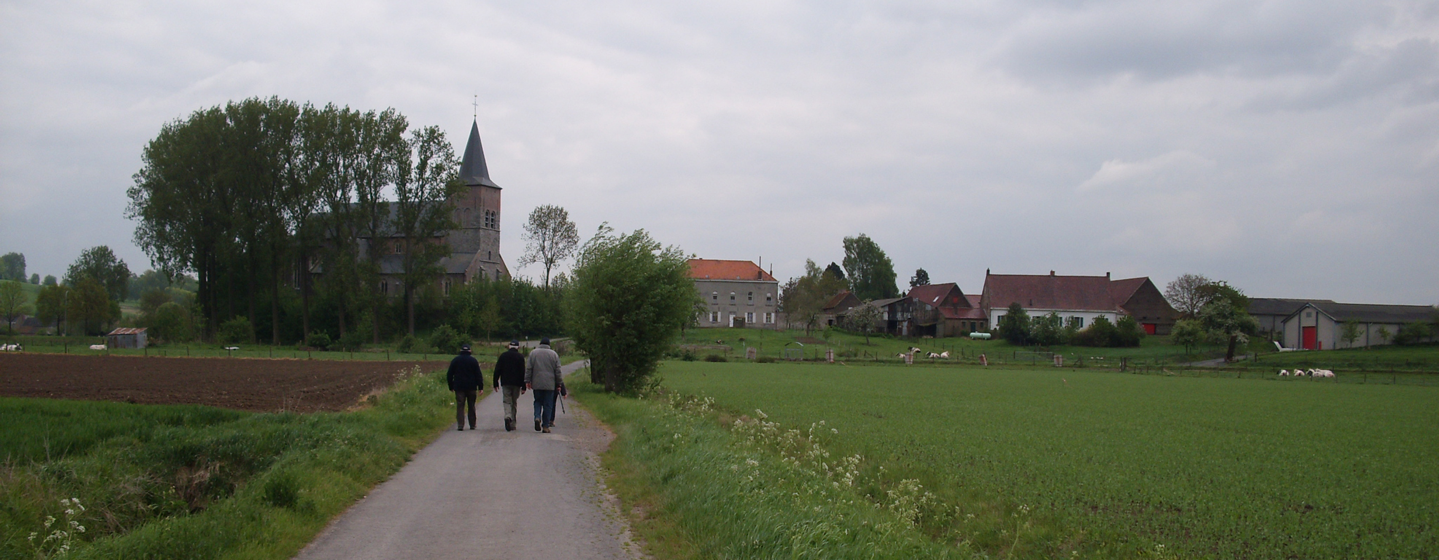 Zicht op het dorp Melden, gezien vanaf de Schelde. Met kerk, klooster en een boederij - Oudenaarde - Oost-Vlaanderen - Vlaanderen - België